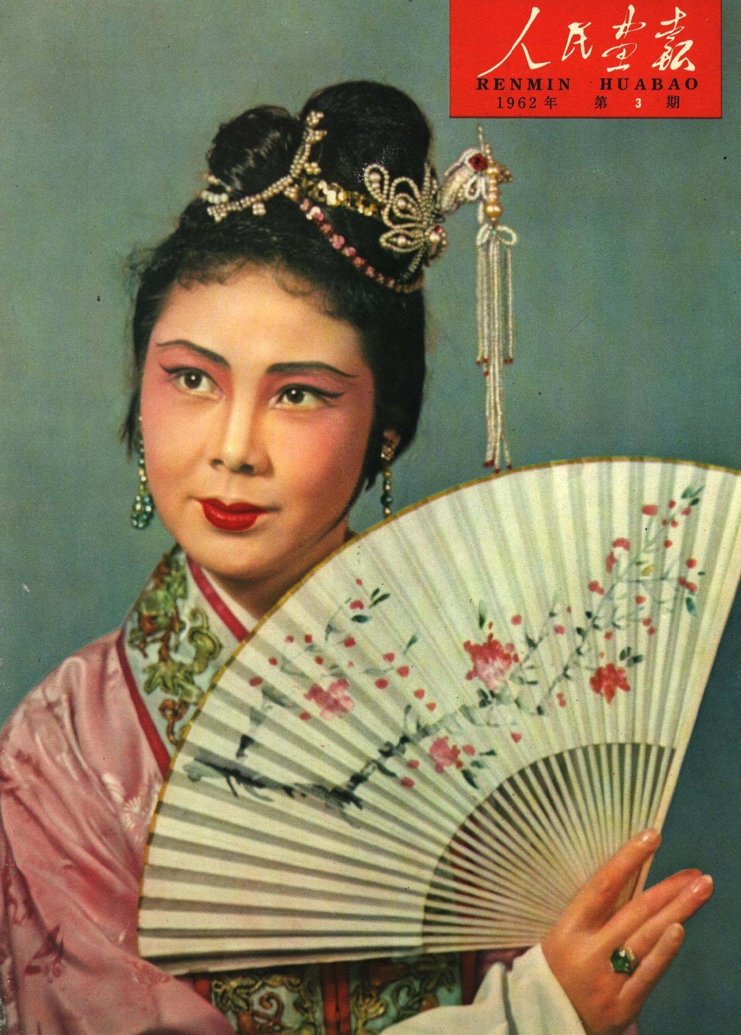 1962-03 1962年 桃花扇 李香君 郑振瑶扮演